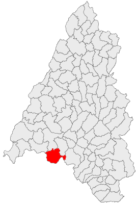 Categorie:Hărţi ale judeţului Bihor